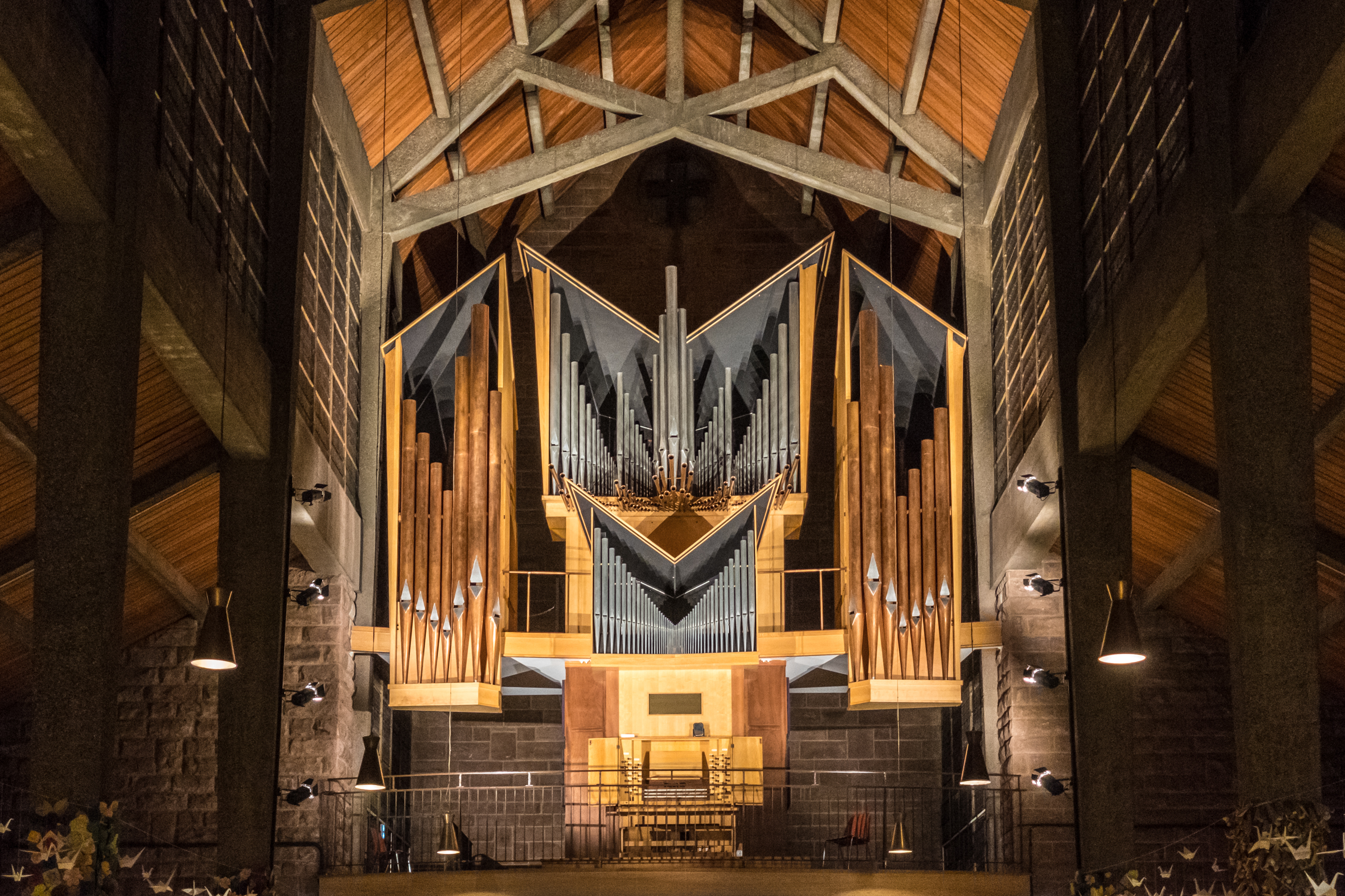 Orgue Schwenkedel du collège Saint-Etienne de Strasbourg 2018